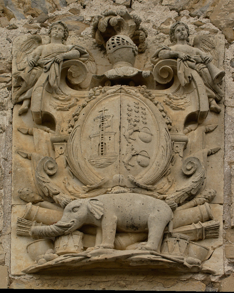 Palacio Casa Simón de Anda Salazar